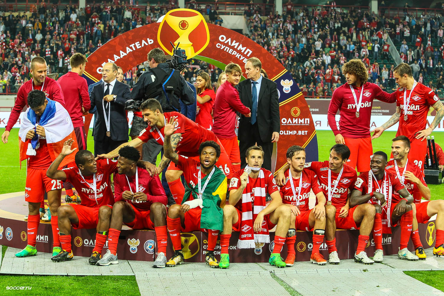 Московский «Спартак» празднует завоевание Суперкубка России по футболу 2017 года